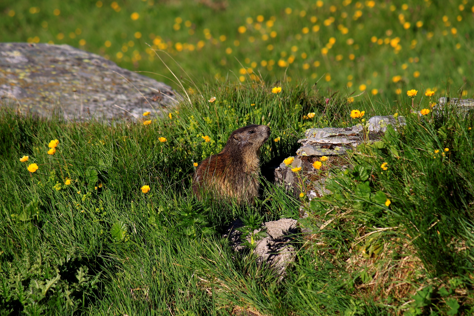 Alpski svizec. Veliki Klek. Avstrija.